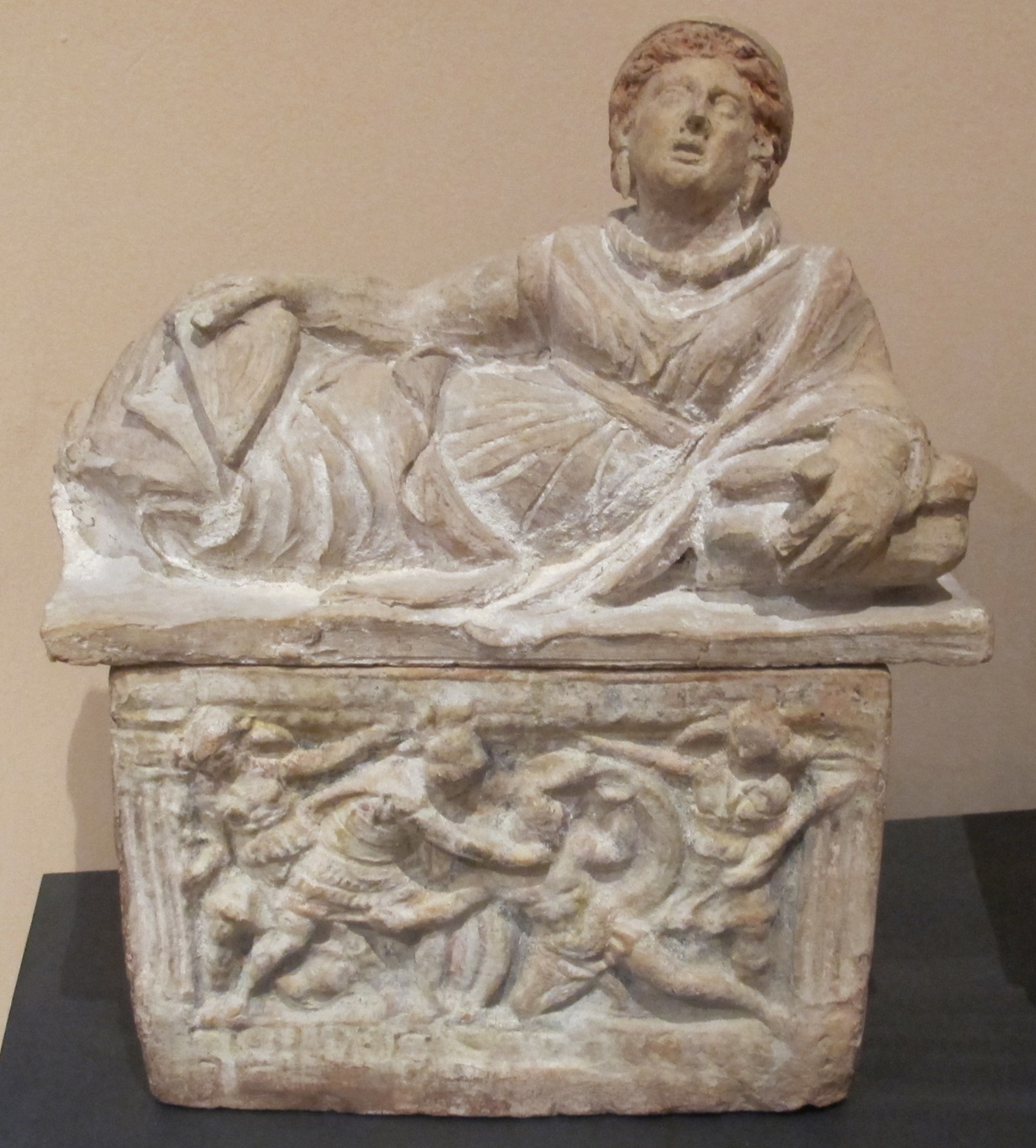 Urnetta cineraria etrusca da chiusi, III-II sec. ac.